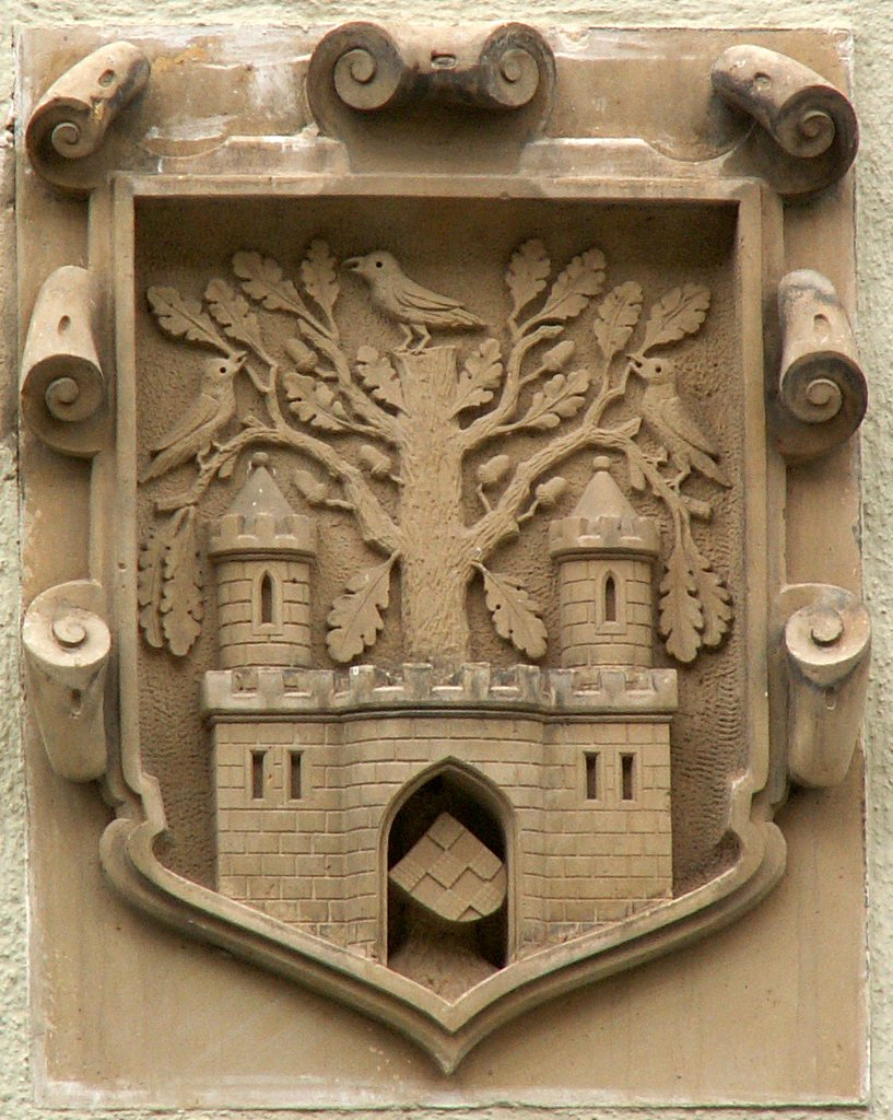 Steinernes Wappen von Aschersleben am Rathaus